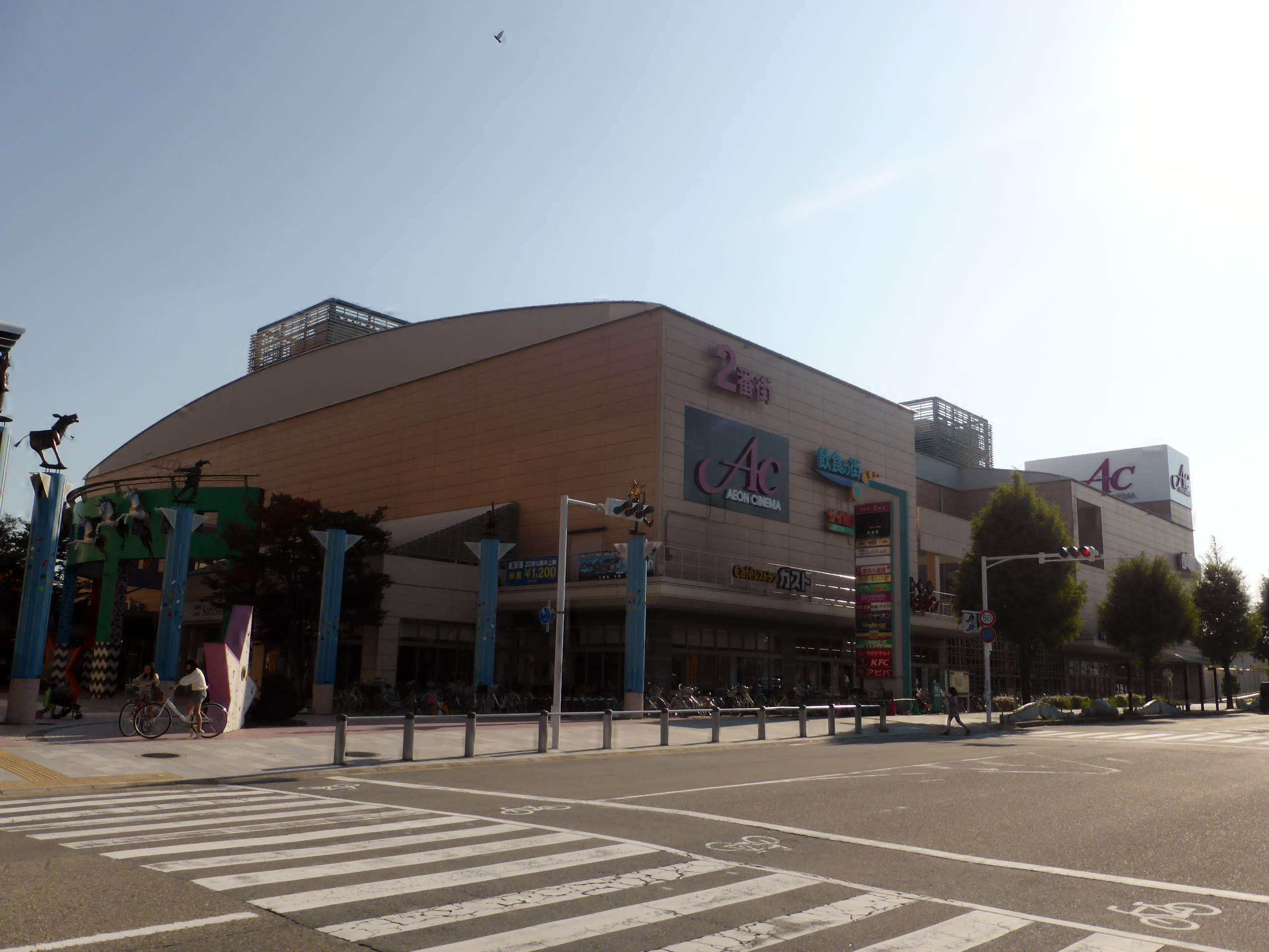 イオン三田ウッディタウン店2番街を撮影。